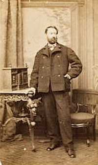 Giampietro Campana di Cavelli(1808-1880), photo-carte de visite. (vers 1865 ?). Location inconnue